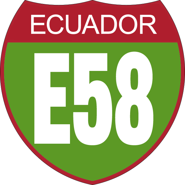 Disco de Identificación Ruta E58